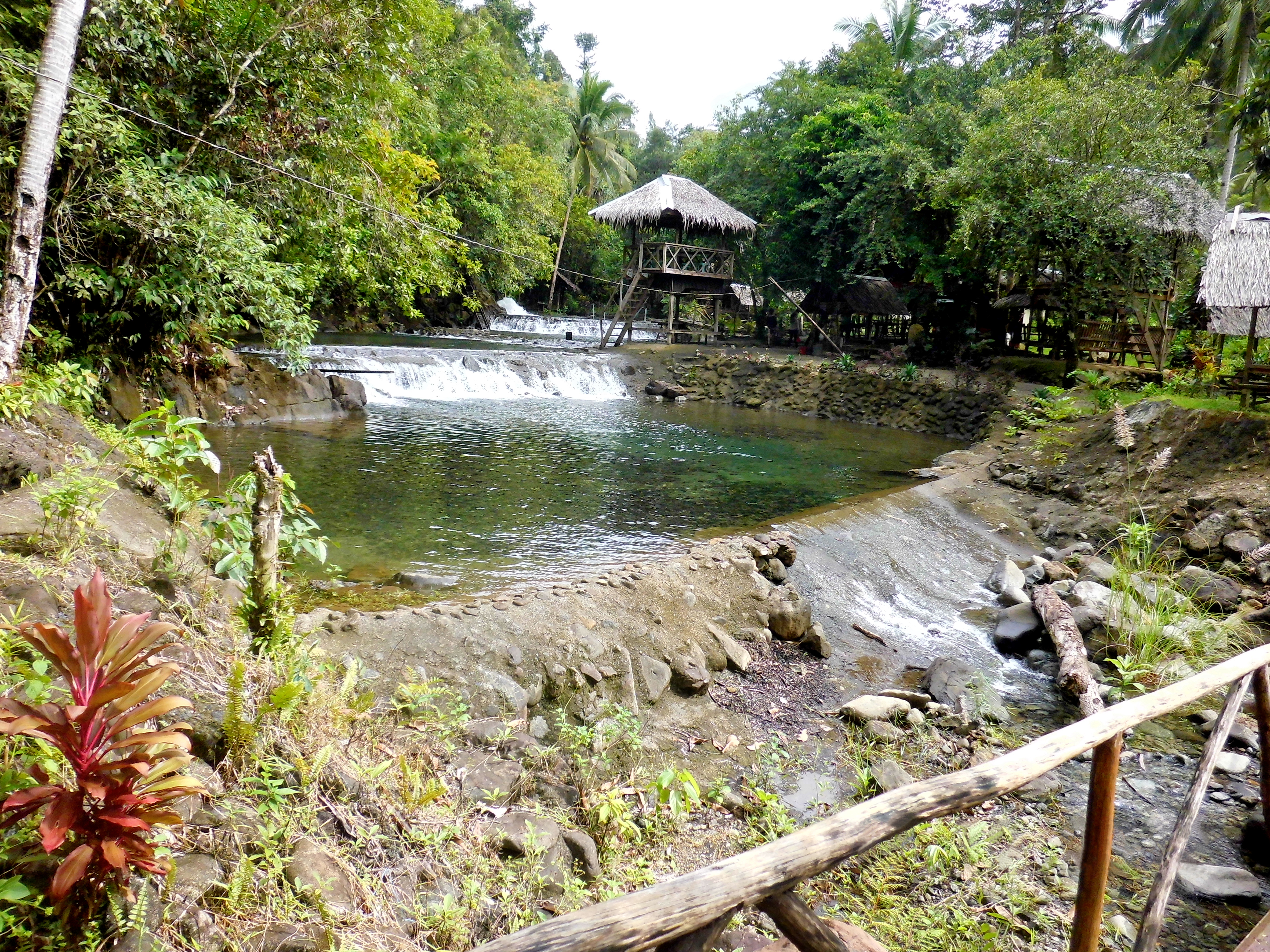 Urwaldbad "Sua cool spring" Totale, Philippines, Surigao del Sur, Madrid (Esperanza)